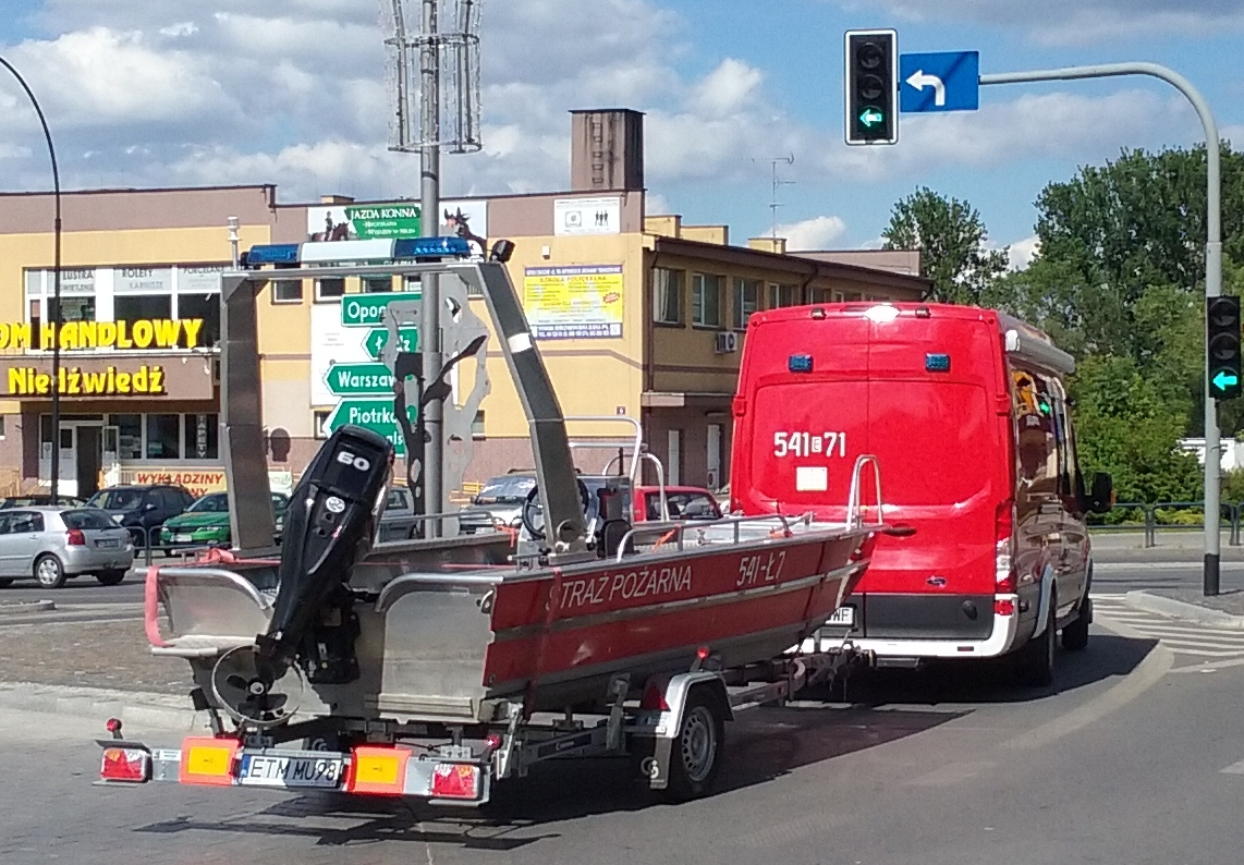 Fire brigade vehicle with boat. Tomaszów Mazowiecki, 2020